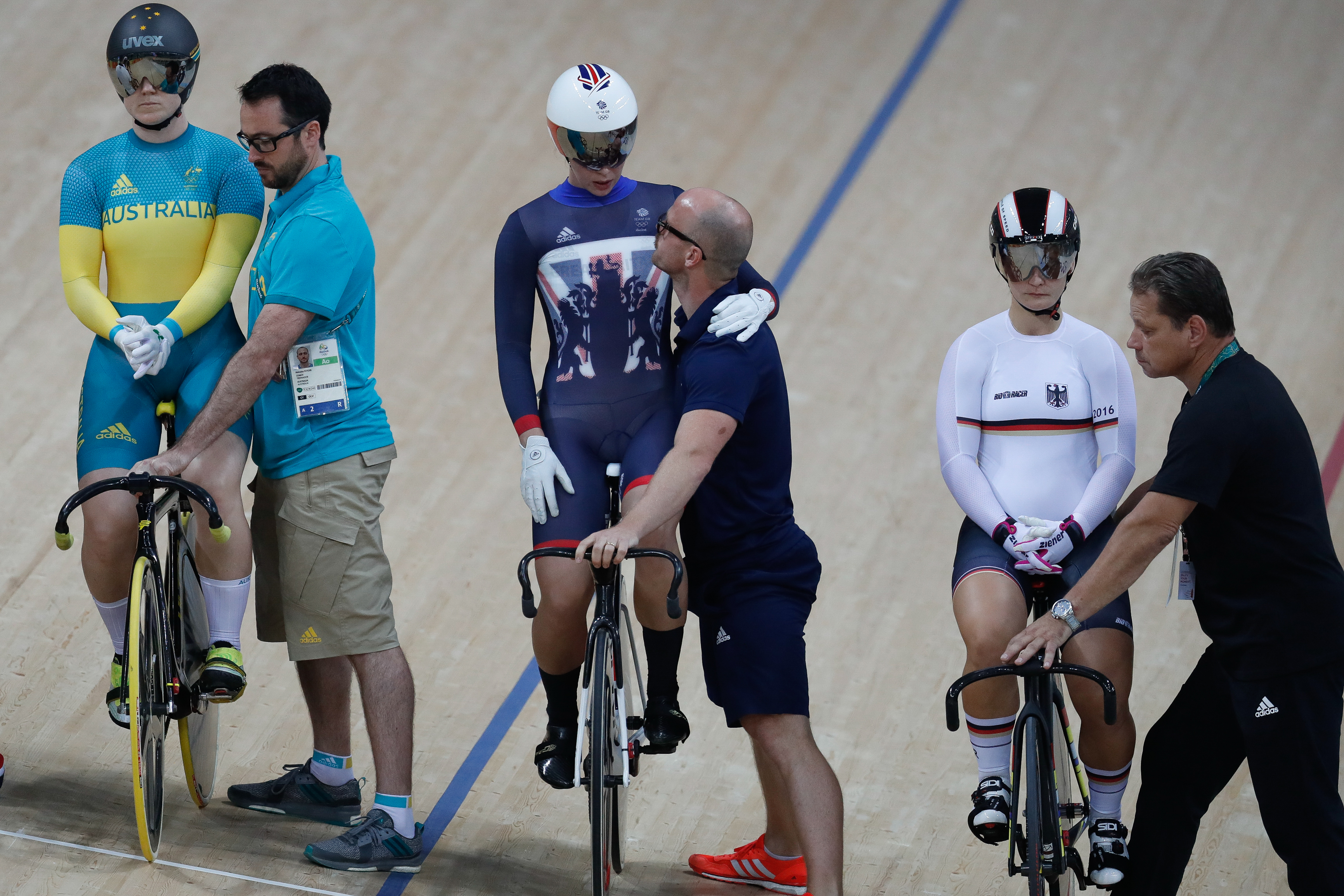 Rio de Janeiro - A holandesa Elis Ligtlee ganha medalha de ouro ao vencer a corrida Keirin de ciclismo no Velódromo dos Jogos Rio 2016, no Parque Olímpico.